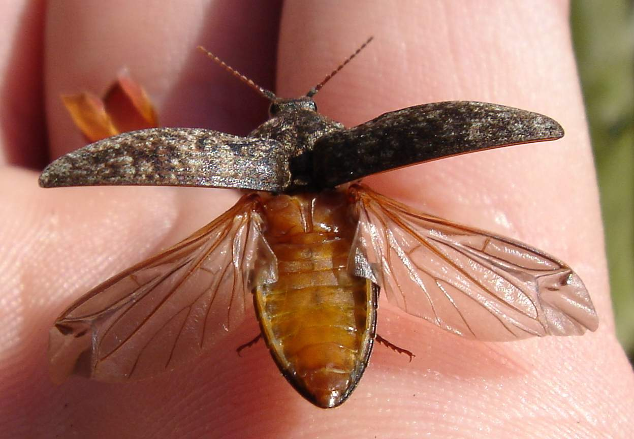 Schnellkäfer der von einer Hand aus abfliegt